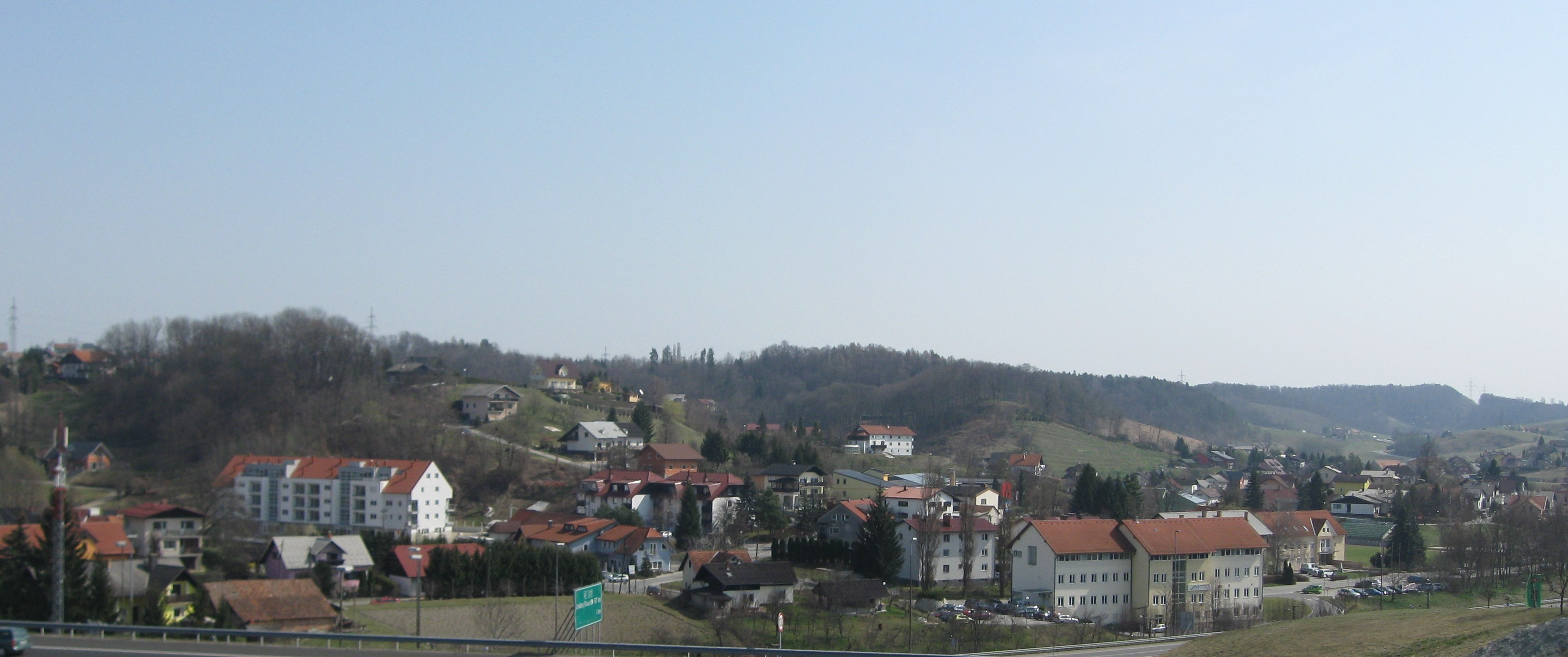 Del naselja Šentilj v Slovenskih goricah, slikano iz smeri parkirišča kasinoja proti Slatkemu Vrhu.